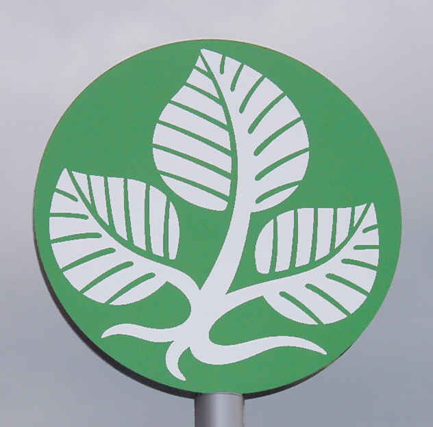 Beschreibung: Schild mit dem Logo der Hochschule Fulda, University of Applied Sciences. Quelle: selbst fotografiert Fotograf: Dieter Schmitt, Fulda